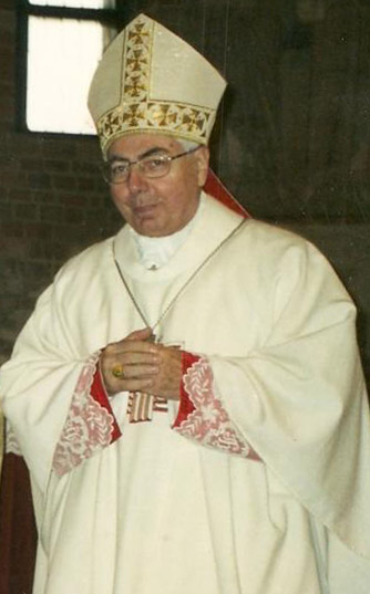 Claudio Baggini - Vescovo di Vigevano